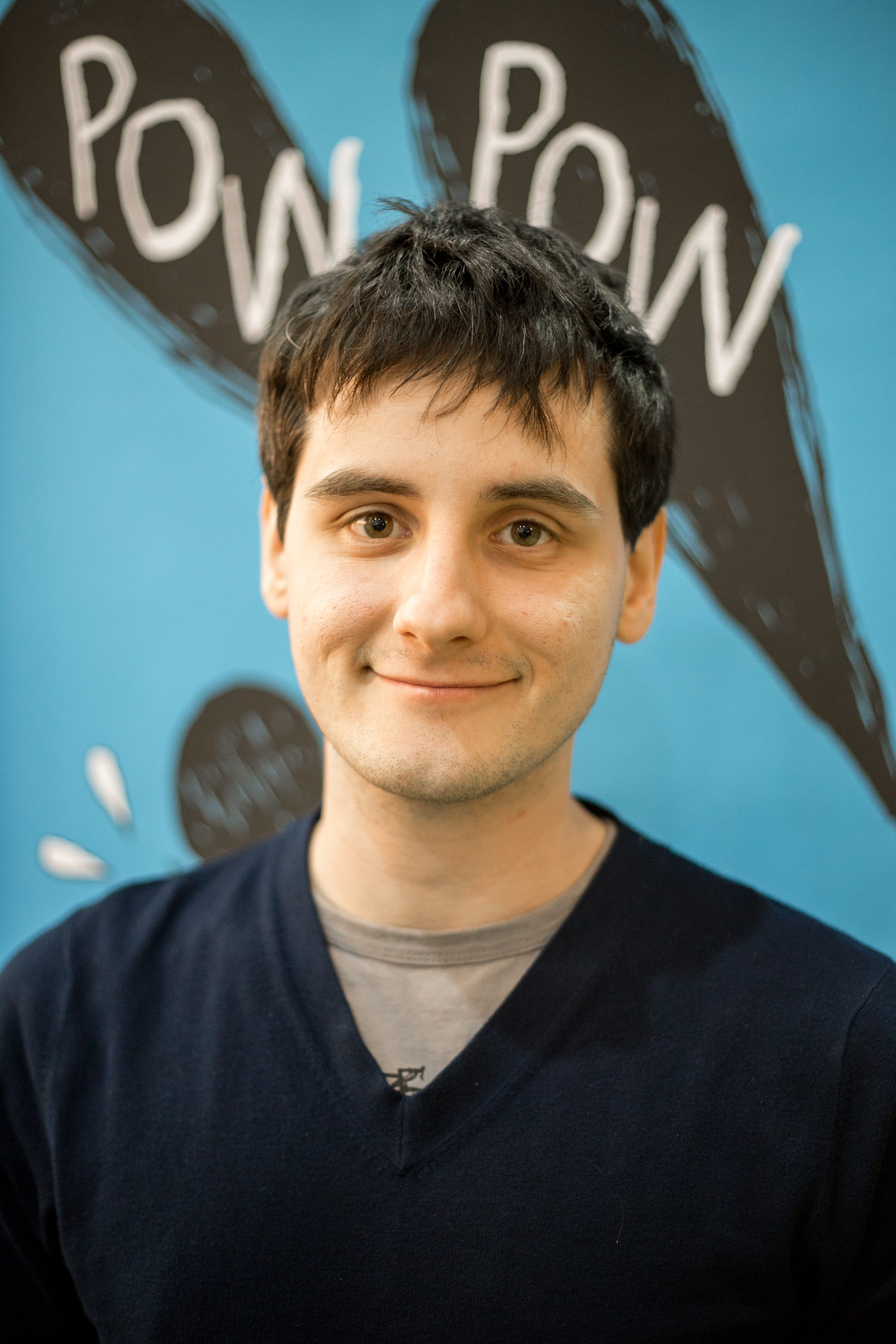 Portrait de Thomas Blais-Leblanc. Photo prise lors du Salon du livre de Québec 2018.